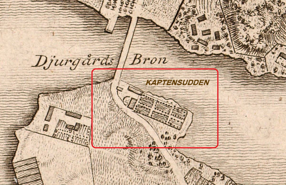 Del 1805 års karta över Stockholm visande Kaptensudden med Pontinska villan på Södra Djurgården